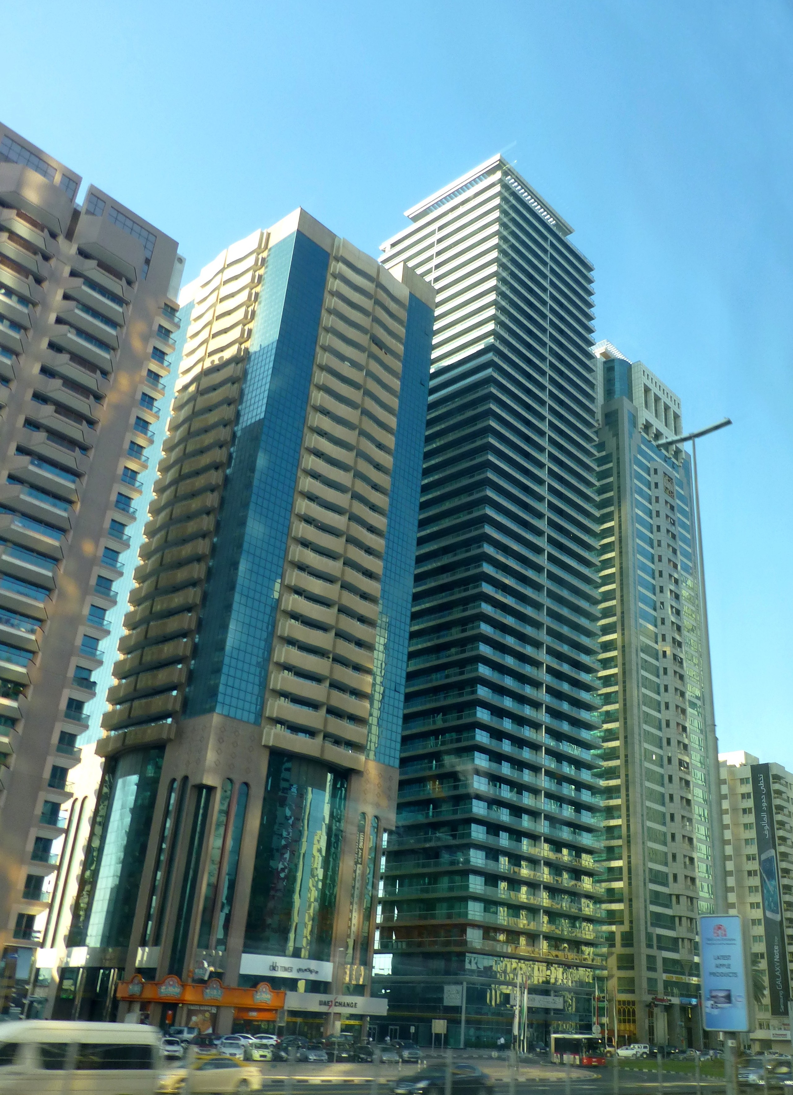 Dubai - Downtown Dubai - Sheikh Zayed Road - Union Tower - Four Points by Sheraton - Saeed Tower 2 - وسط مدينة دبي - شارع الشيخ زايد - برج الاتحاد - فور بوينتس باي شيراتون - سعيد برج